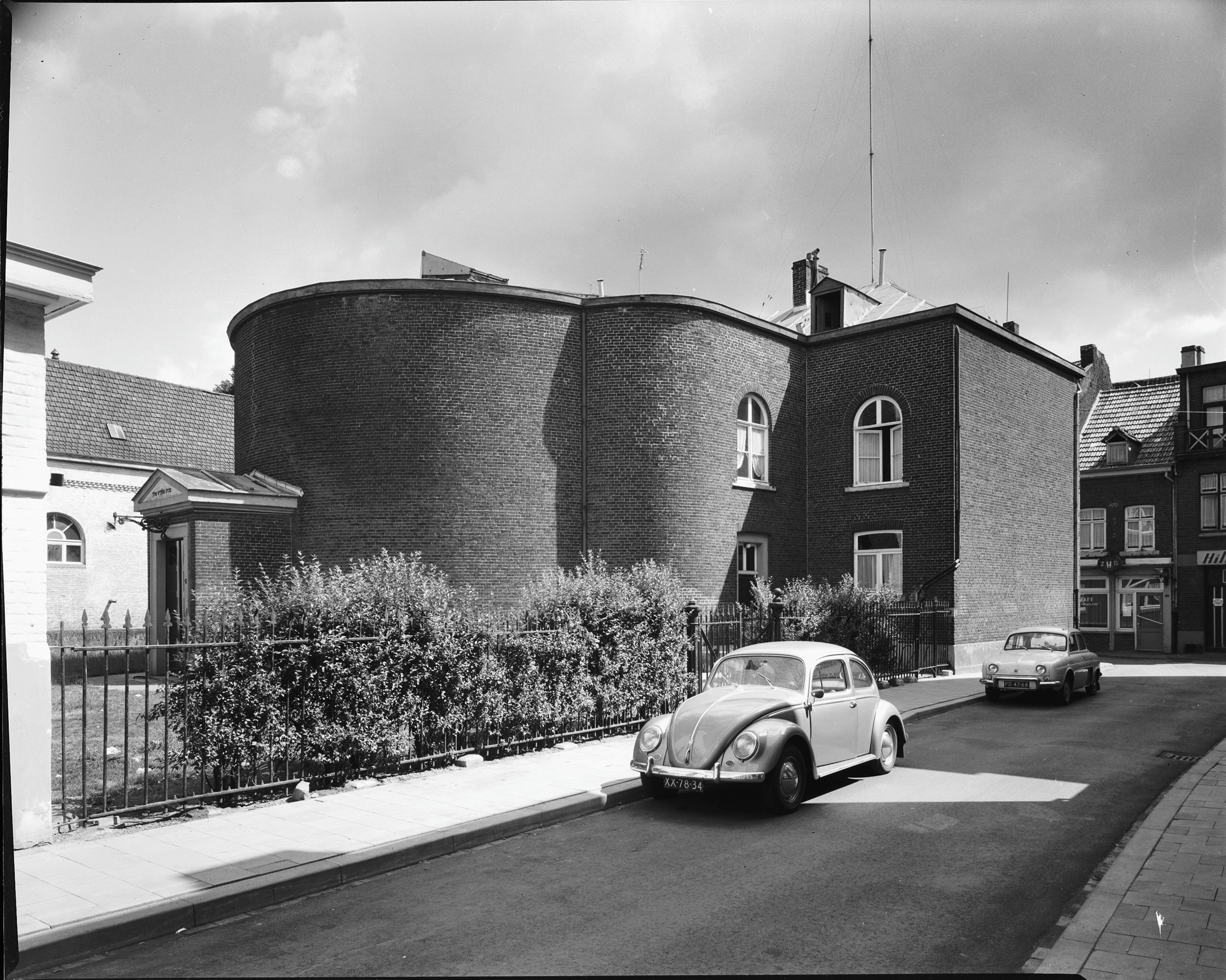 Synagoge: exterieur